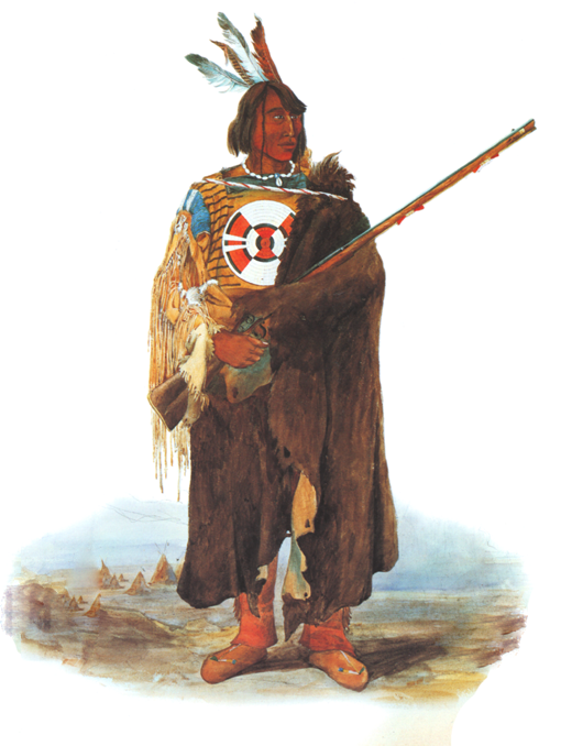 young Amerindian (1833)